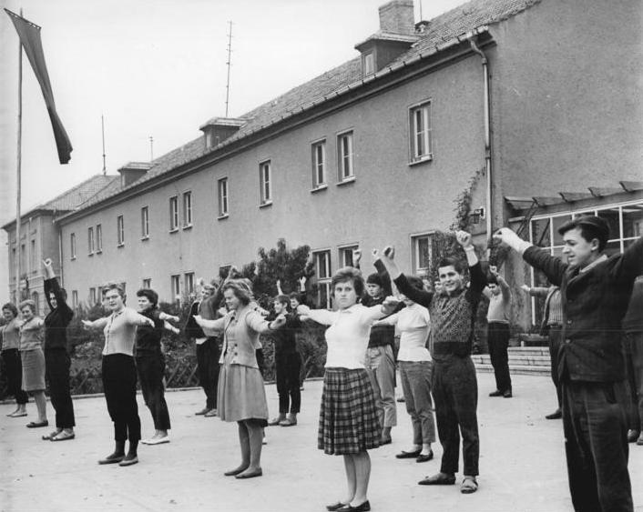 Pausengymnastik in der Berufsschule Zentralbild Karnitzki 1.11.1962 Nachsuche für die sozialistische Landwirtschaft - Vorbildliche Lehrlingsausbildung im VEG Wilmersdorf. 85 Lehrlinge und drei Bürger aus der Republik Ghana werden in der Betriebsberufsschule des VEG WilmersdorfI im Kreis Angermünde zu Facharbeitern in den Zweigen Rinderhaltung oder Feldbau ausgebildet. 4 Lehrlinge erlernen den Beruf des Schäfers. Die Ausbildung dauert für Abgänger der 7. und 8. Klasse 2 Jahre und für die 11 Abiturienten 1 Jahr. 12 Lehrlinge - es sind Schüler, die die 10. Klasse abgeschlossen haben - legen nach drei Jahren zugleich mit der Facharbeiterprüfung auch das Abitur ab. Die Lehrlinge, die eine sehr praxisverbundene Ausbildung erhalten in den Landwirtschaftlichen Produktionsgenossenschaften eingesetzt. Soweit es sich um Abiturienten handelt, werden sie das Studium an einer Hoch- und Fachschule aufnehmen. UBz. Pausengymnastik. Im Hintergrund die in den letzten Jahren neuerbaute Betriebsberufsschule.